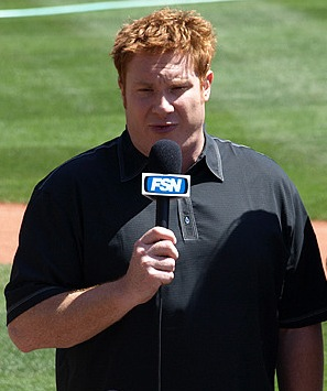 Atlanta Braves broadcaster Jon Sciambi, 2008